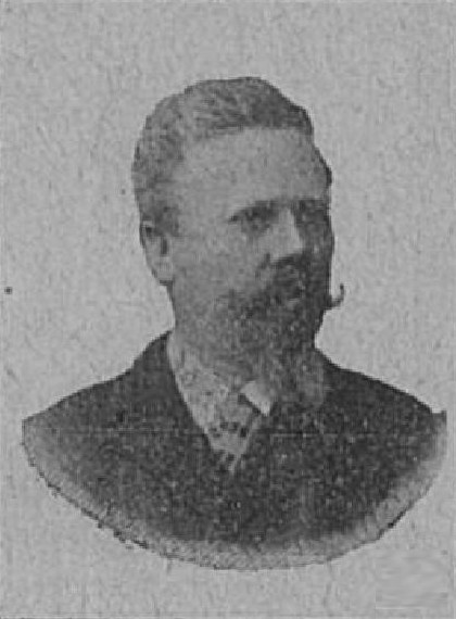 Václav Němec (1845-1924), rakouský a český zlatník, podnikatel a politik